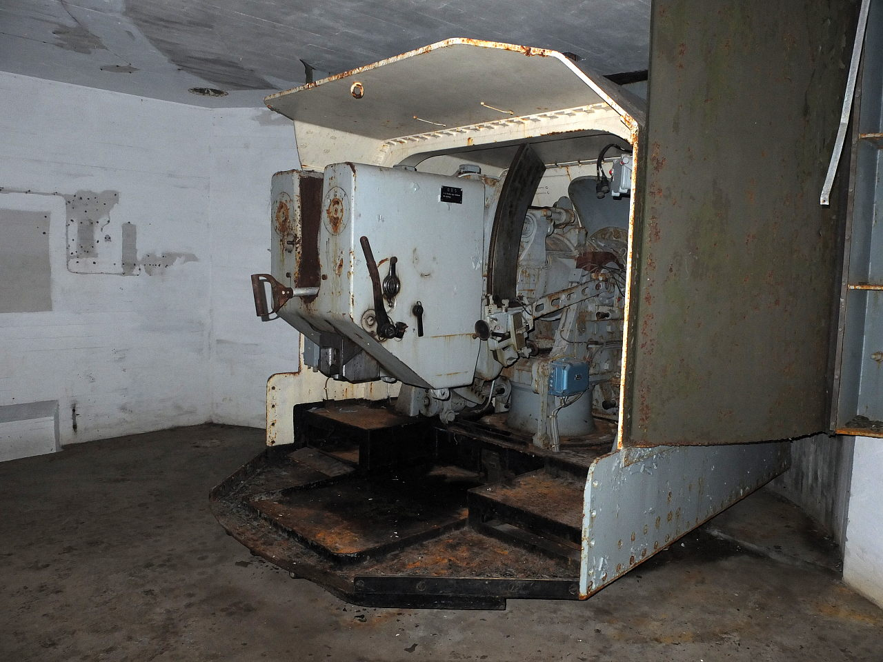 Rauøy fort i Oslofjorden